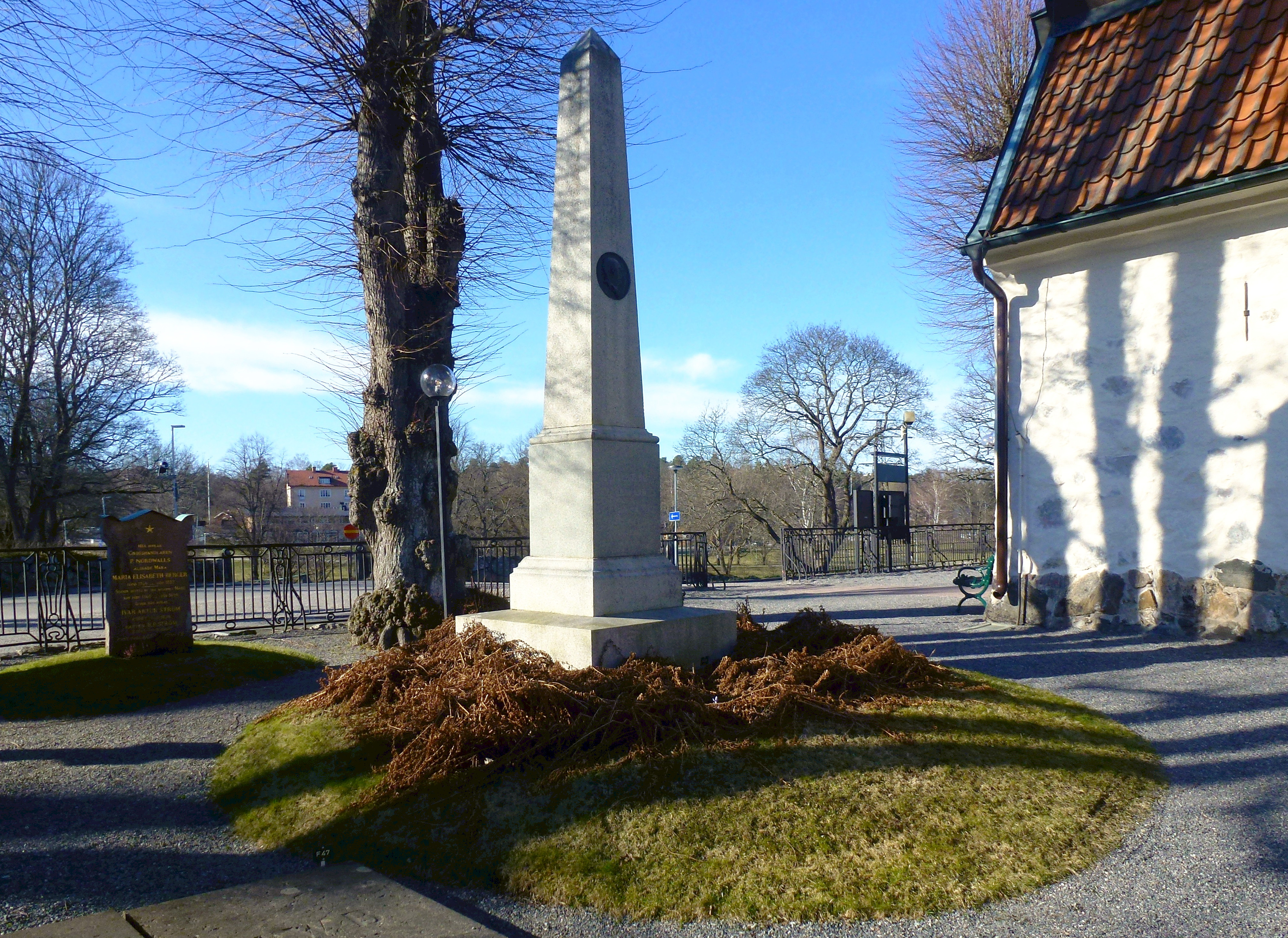 Zetterbergs familjegrav vid Lidingö kyrka